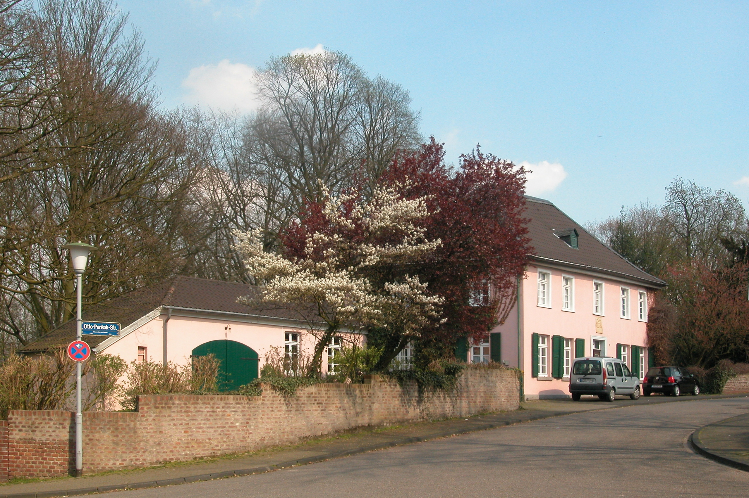 Otto-Pankok-Haus in Mülheim an der Ruhr/Saarn Kamera-Position: Holunderstraße, Blick nach Osten Objekt:51°24′14.95″N 6°52′47.01″E / 51.4041528°N 6.879725°E